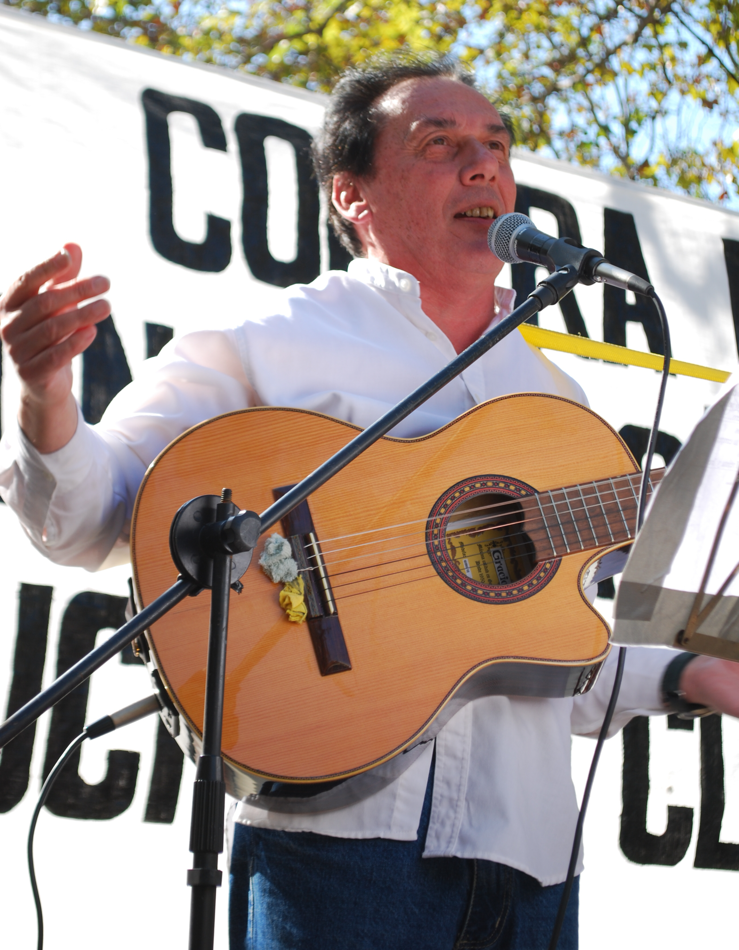 Fotografía del artista de Uruguay Jorge Bonaldi, en el acto por el día de los trabajadores realizado en la Plaza Cagancha de Montevideo.